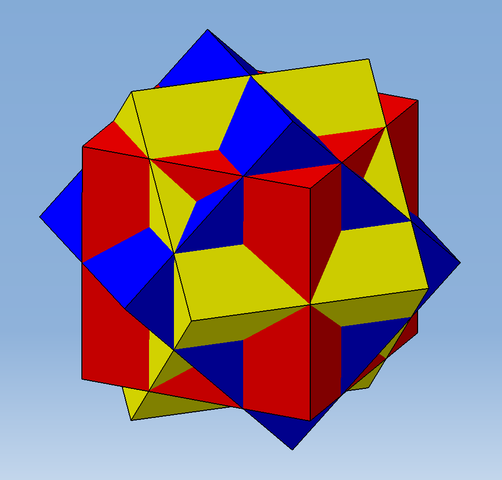 Drei-Würfel-Komposit